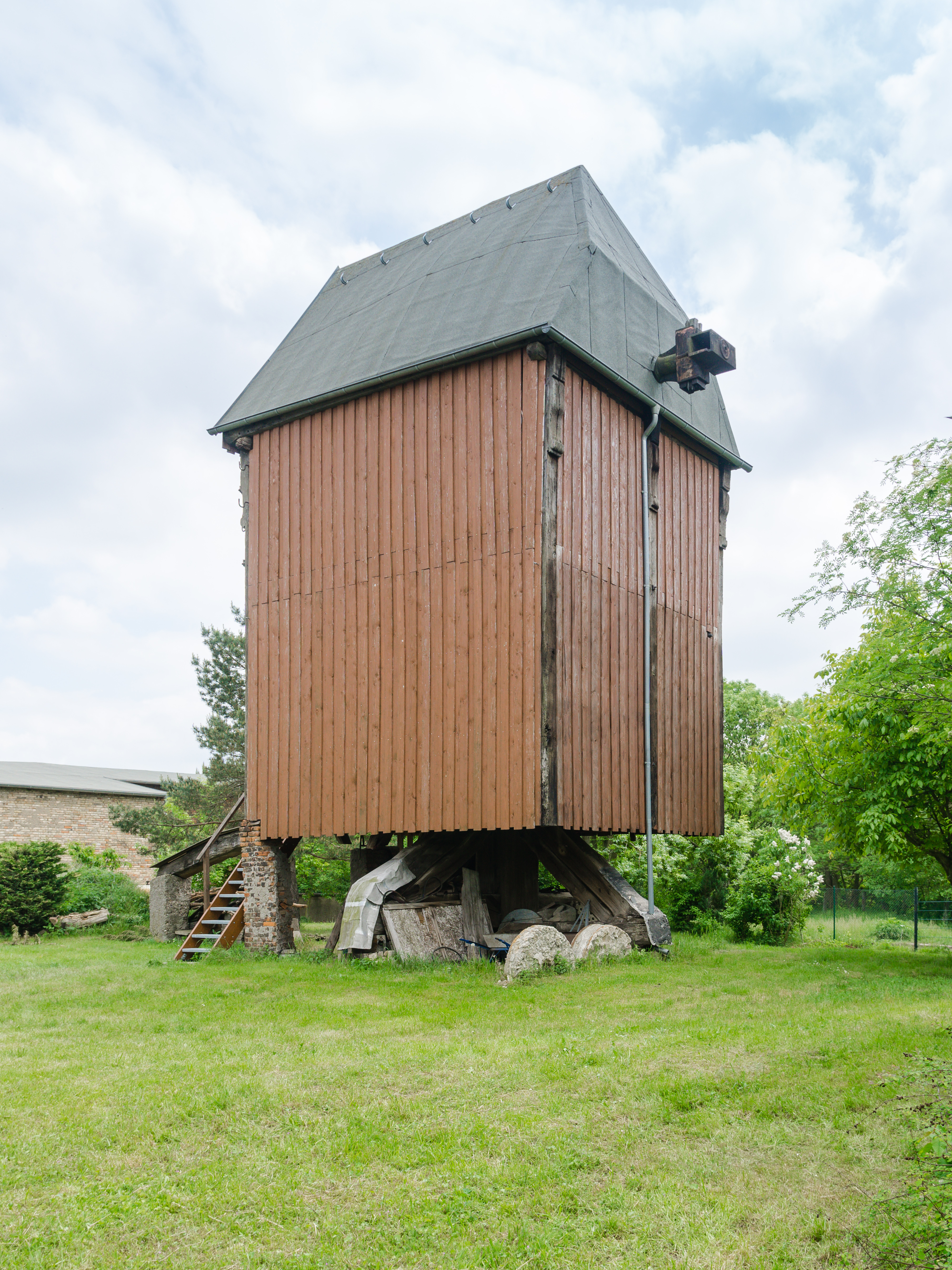 Bockwindmühle, Mühlenweg 1 in Weißenfels OT Großkorbetha